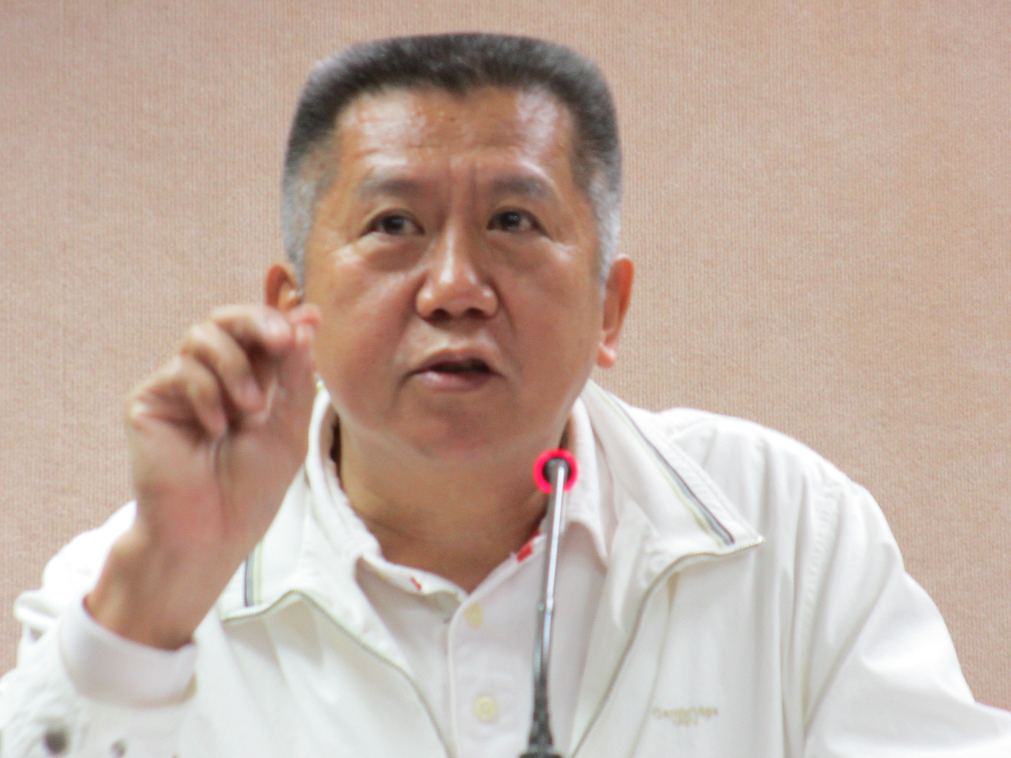 Yang Ying-hsiung